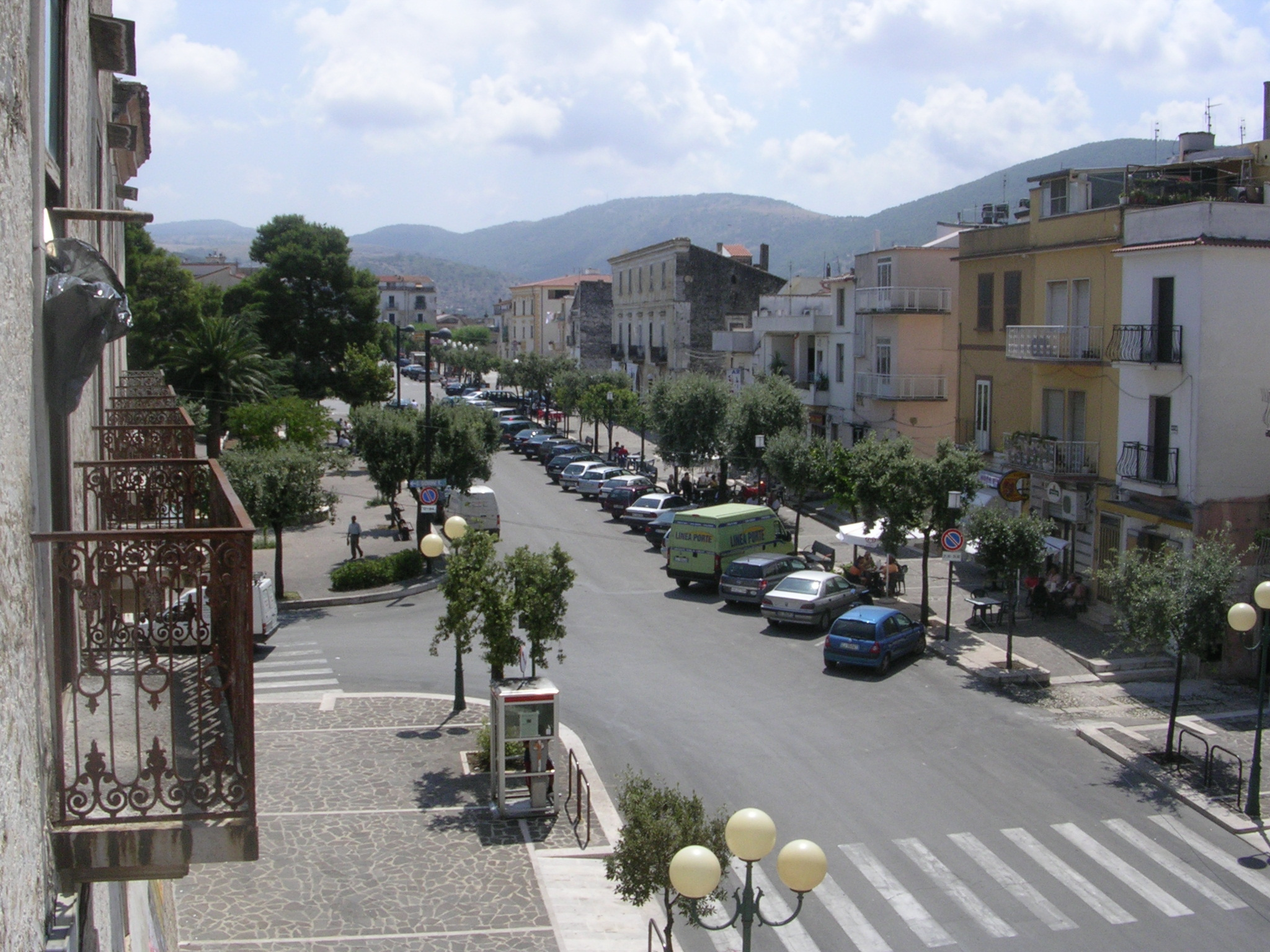 Panoramica di Corso Giannone a Cagnano Varano